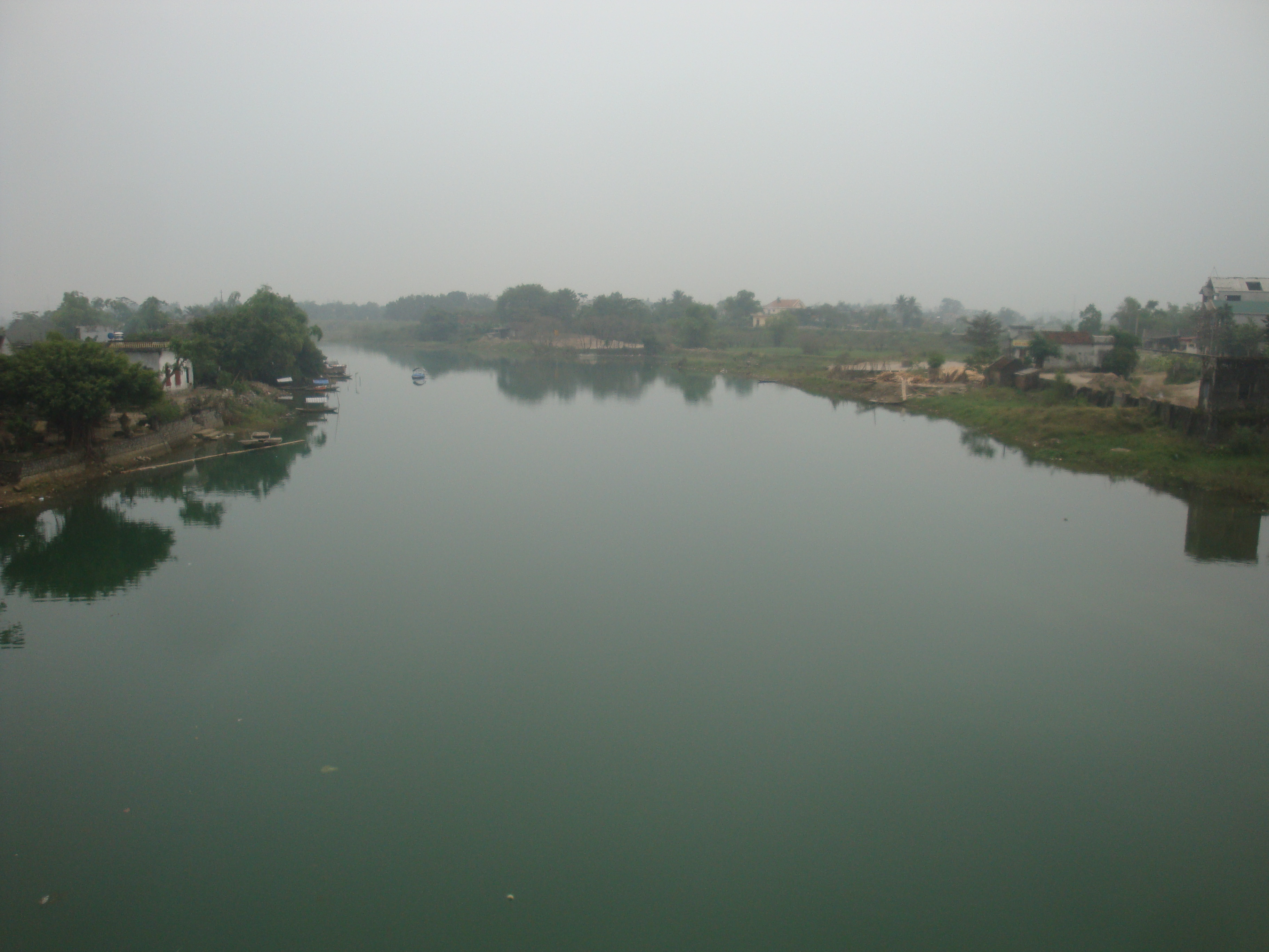 Sông Lạng, nhìn từ cầu Nho Quan